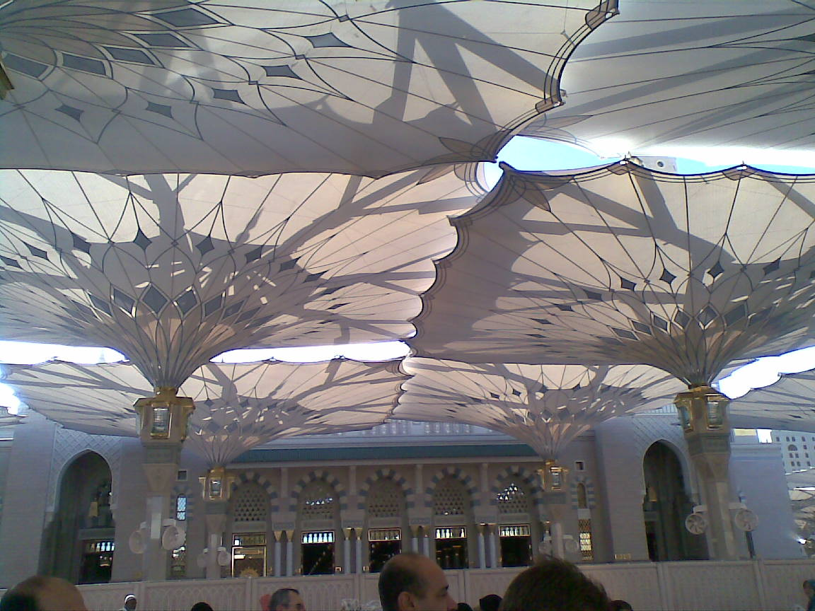 മദീന പള്ളിയുടെ മുറ്റത്ത്‌ സ്ഥാപിച്ച വലിയ കുടകൾ